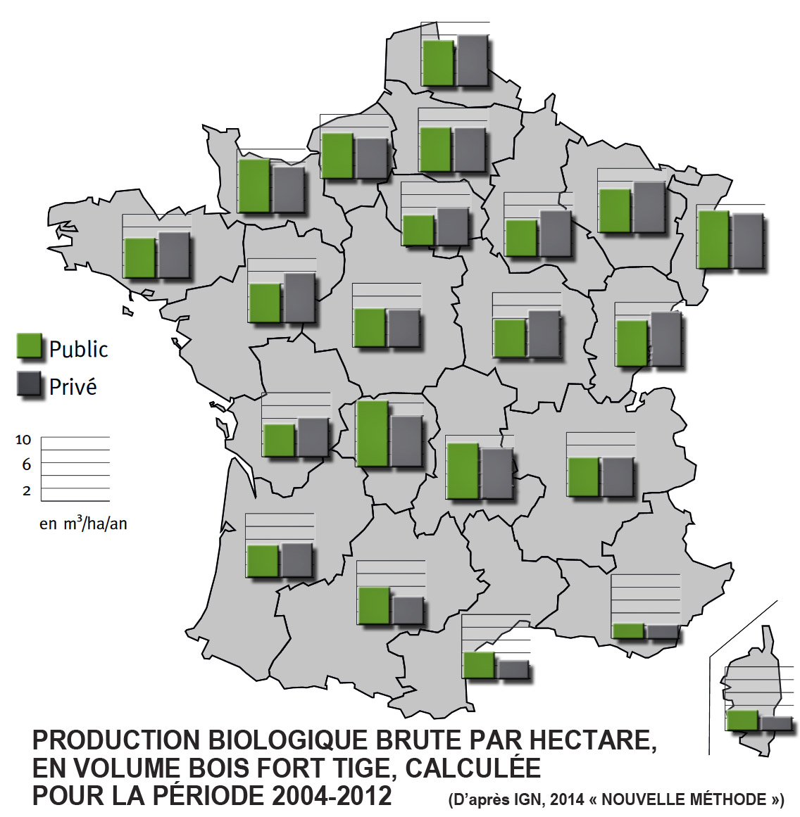 carte présentant, d'après les données de l'inventaire forestier national français la production biologique brute par hectare de "bois fort tige" pour la période 2004 2012. Attention les données plus anciennes sont été produites sur la base d'une autre méthodologie et ne sont donc pas directement comparables (et moins précises, selon l'IFN, maintenant assuré par l'IGN)